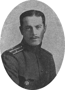 Корнет Вячеслав (Вацлав) Игнатиевич Быховец, убитый в бою под Ровно.